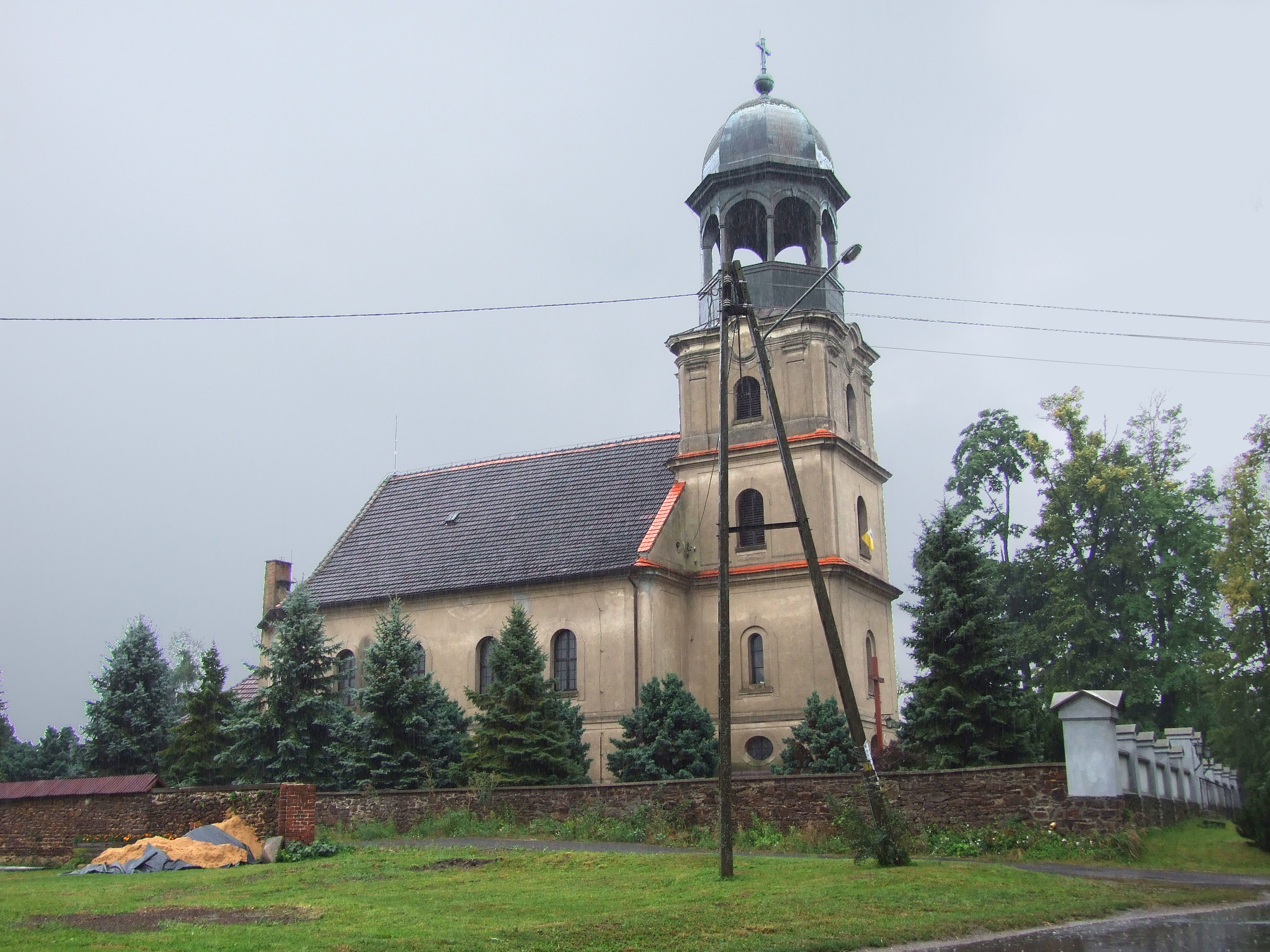 Kościół św. Jacka w Biskupicach (powiat oleski)